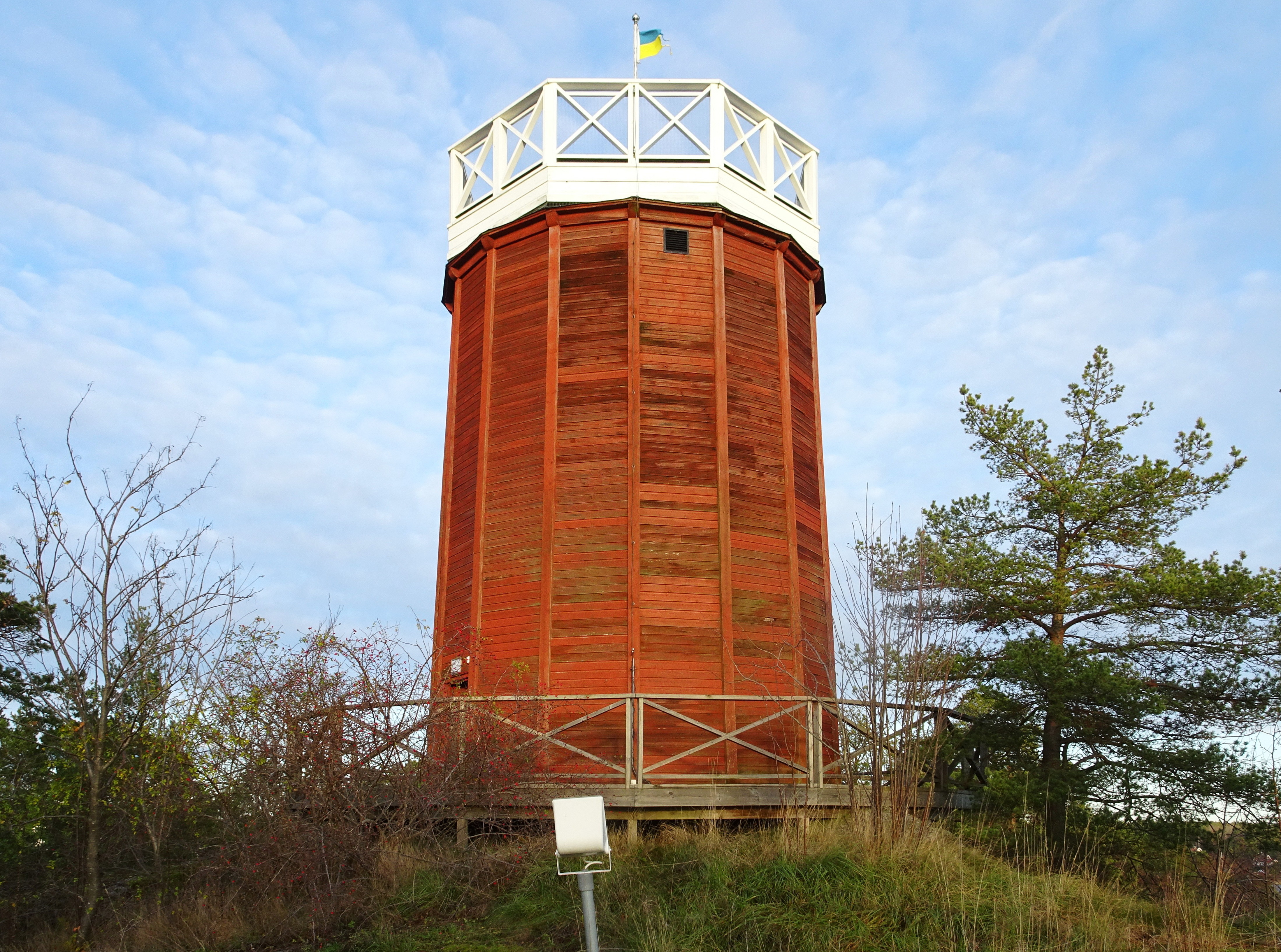 Nynäshamns gamla vattentorn på Trehörningen, numera utsiktstorn